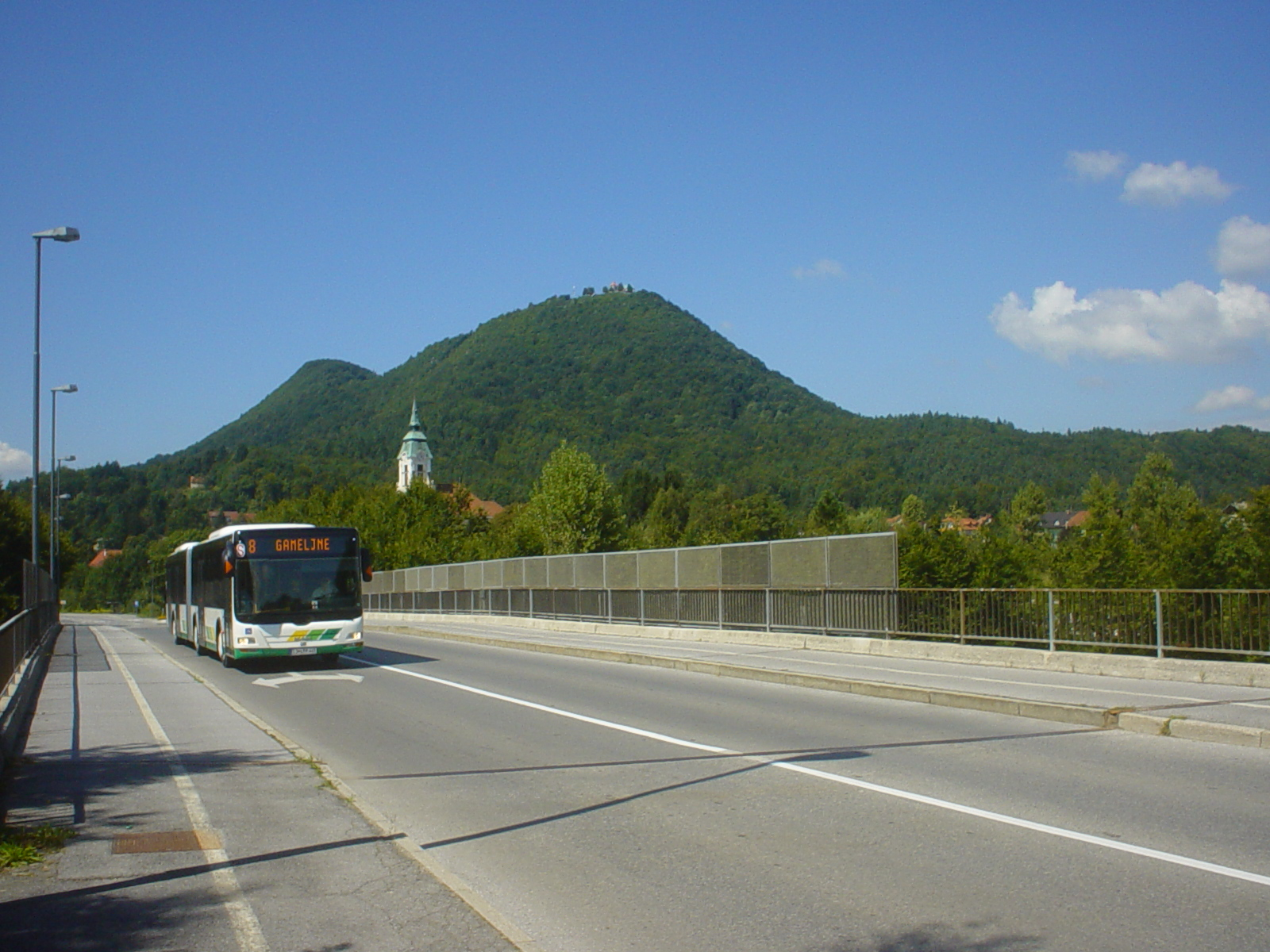 Avtobus na nadvozu gorenjske avtoceste v bližini Šmartnega, v ozadju se dviga Šmarna gora.